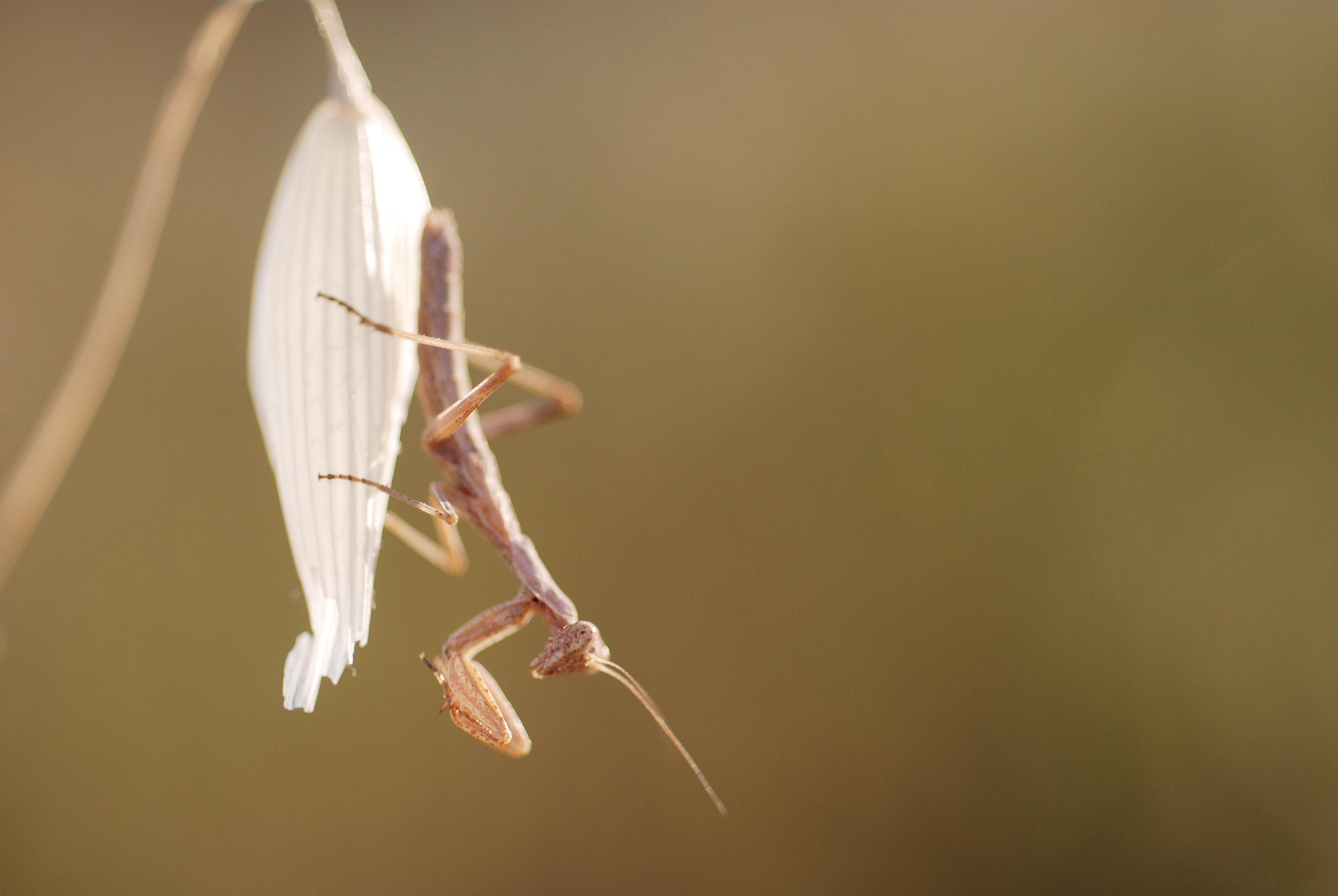 Ameles decolor larvae